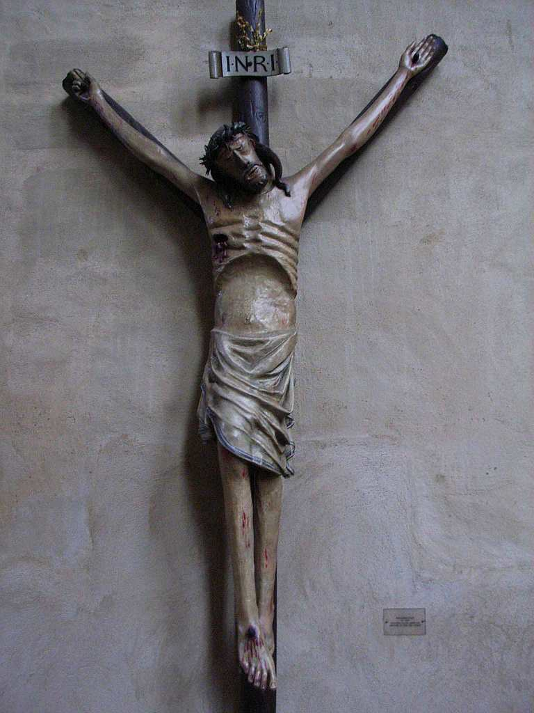 Dalheimer Kreuz, 13. Jh. Christoffelkathedrale Roermond, NL